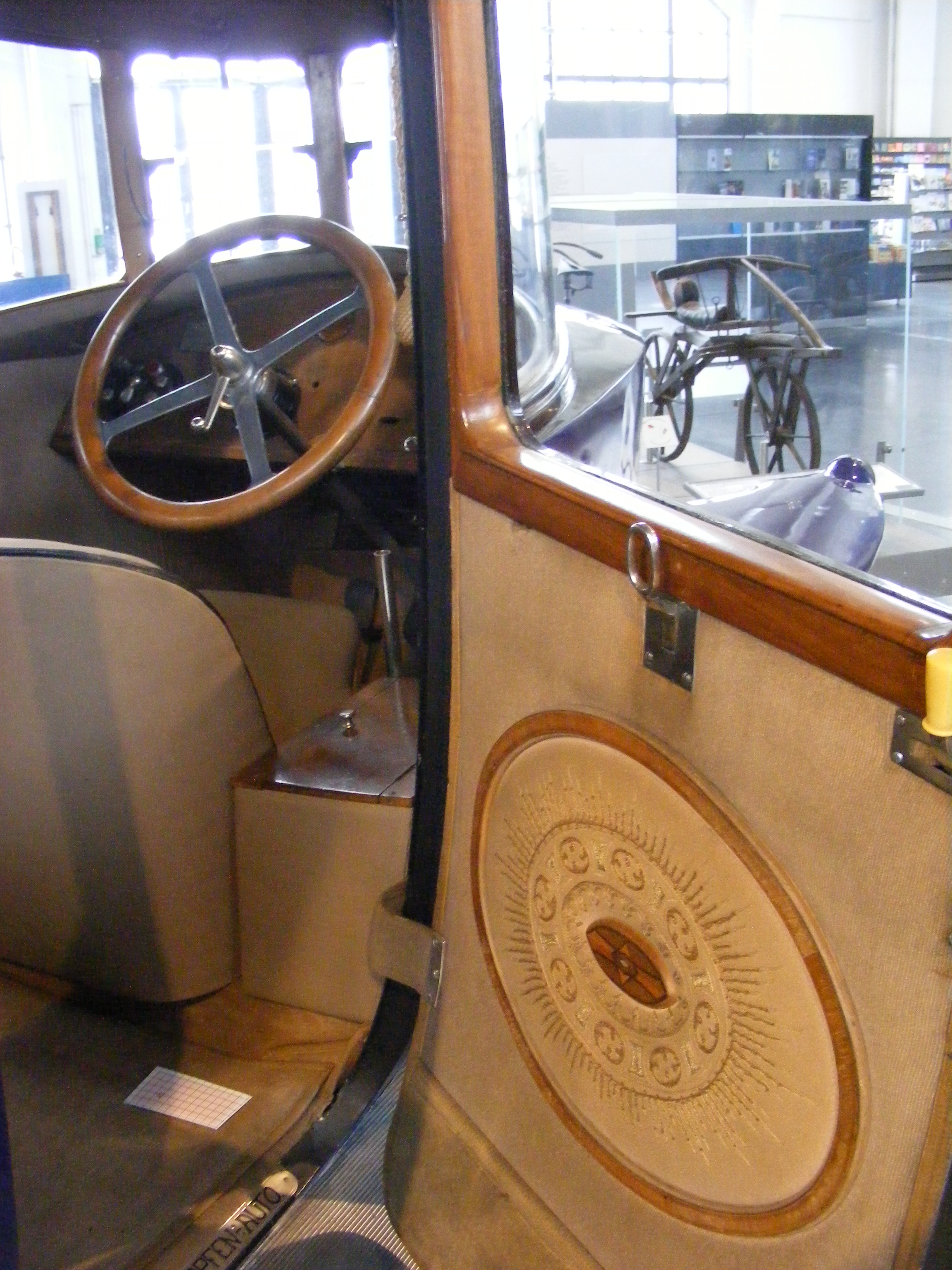 Rumpler-Tropfenwagen, rechte Tür — Exponat im Deutschen Museum Verkehrszentrum München